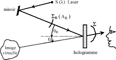 Description : Principe de la lecture d'un hologramme Source : Personnelle Statut